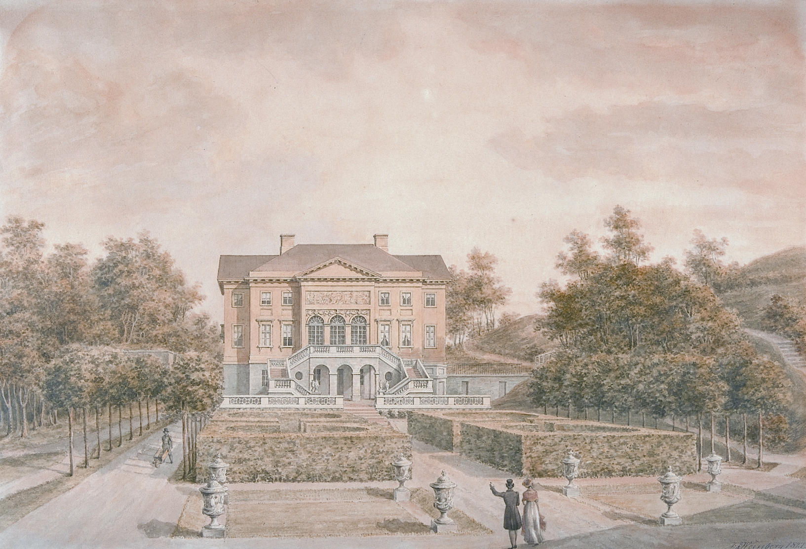 Akvarell föreställande Gunnebo slott, Mölndal, Västergötland, av Justus Friedrich Weinberg (1770-1832). Signerad med årtal 1827.